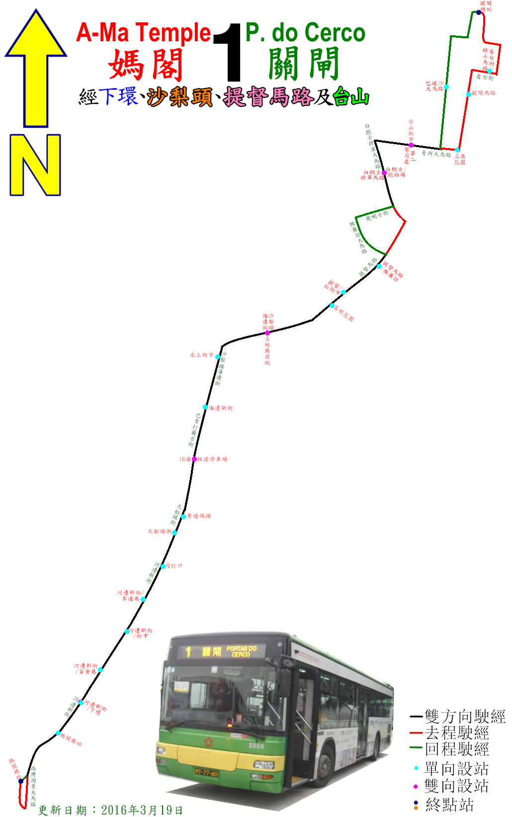 中文（香港）: 澳門巴士1路公車的走線圖